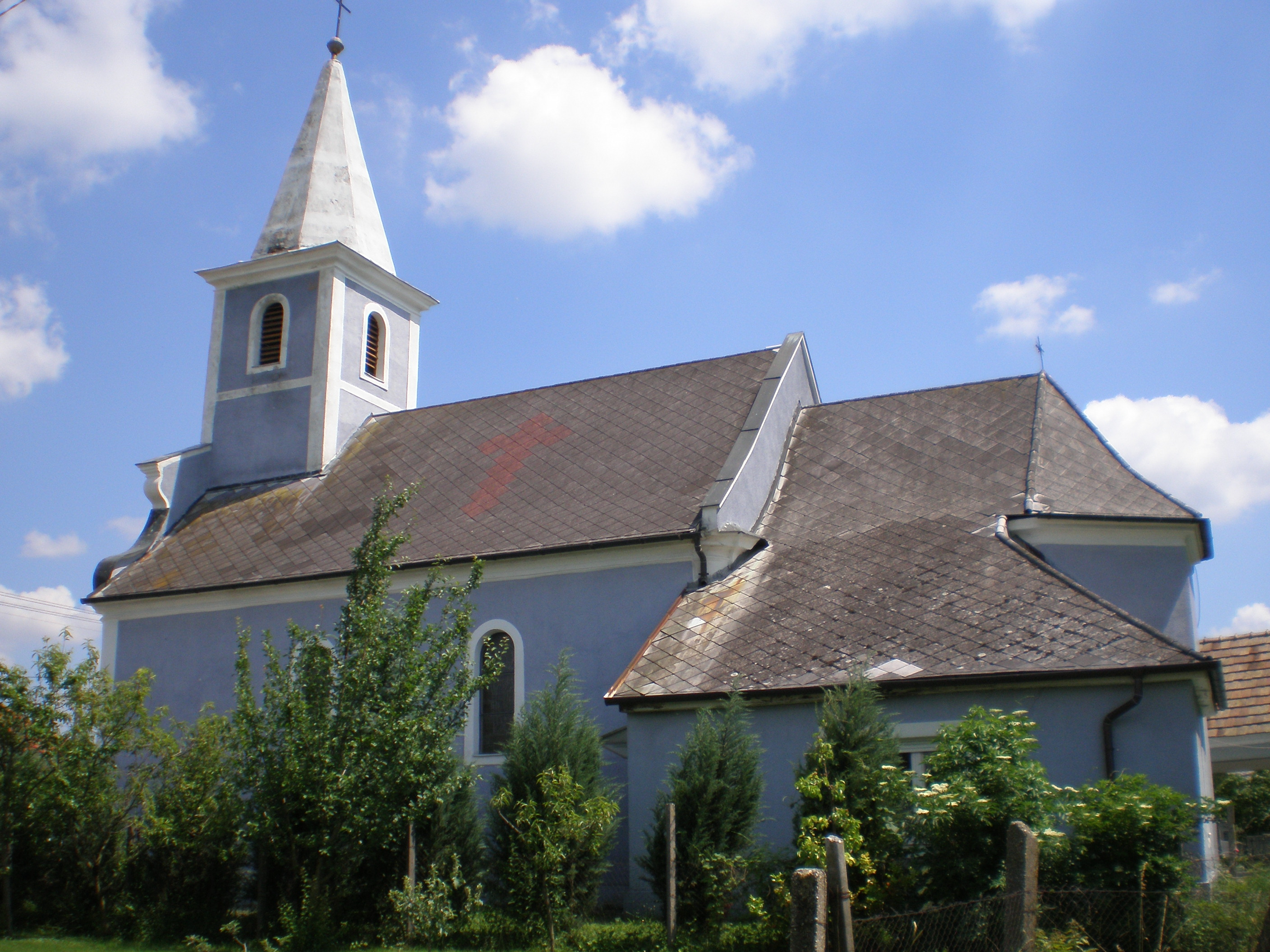 1812-ben épült római katolikus templom